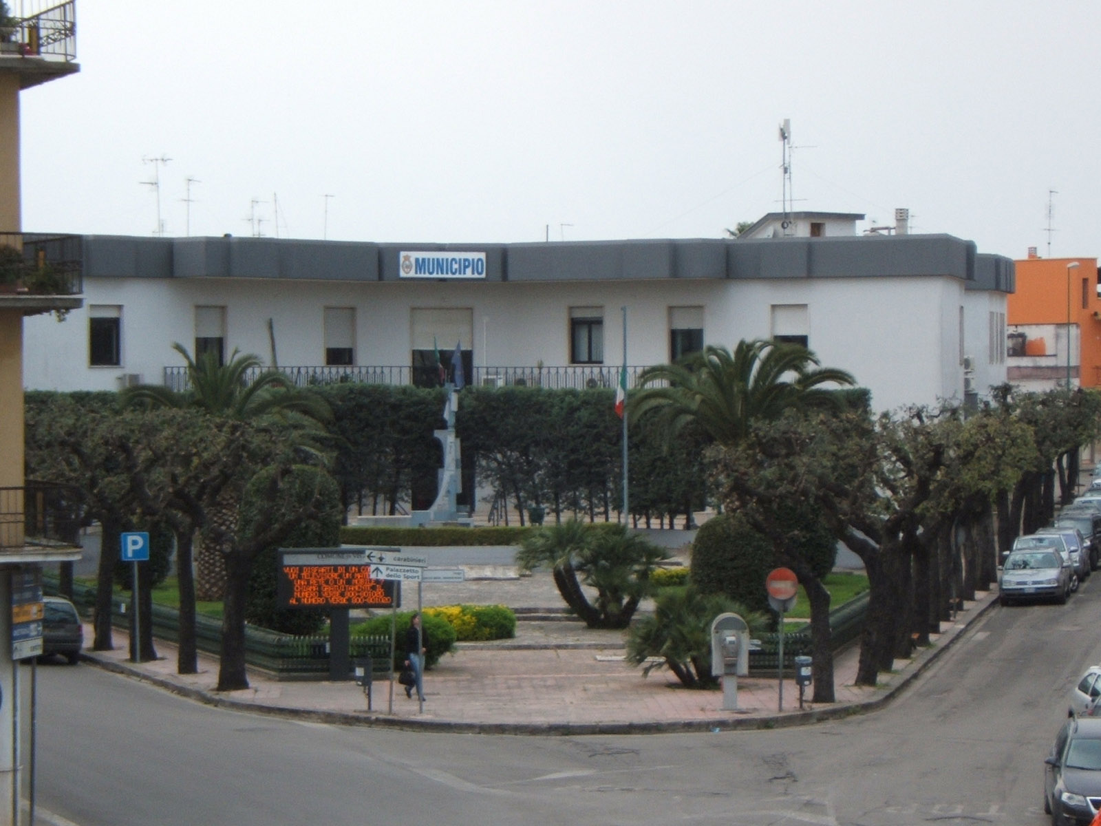 foto diurna del nuovo municipio del comune di Veglie (LE)